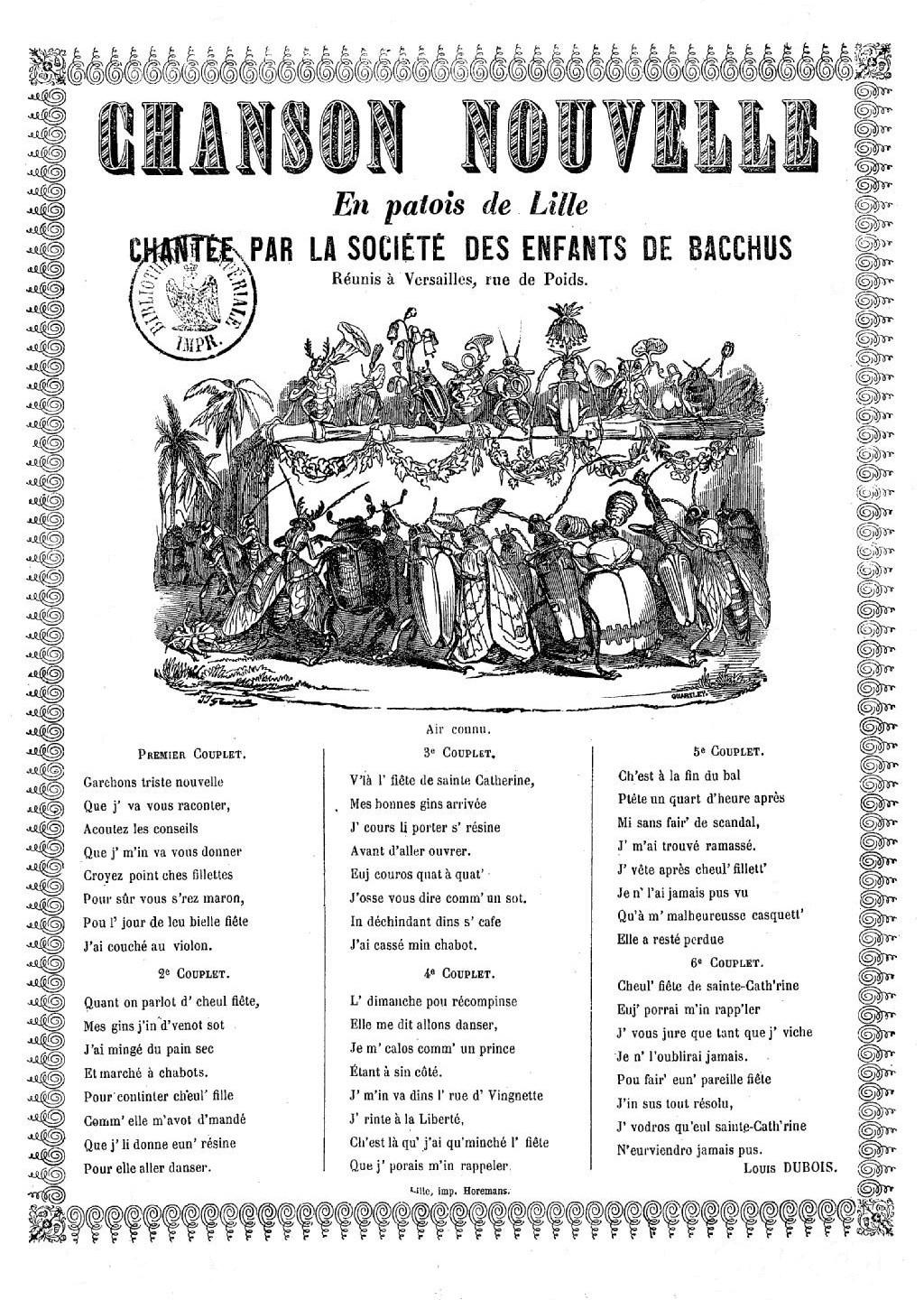 Chanson de goguette lilloise en patois.